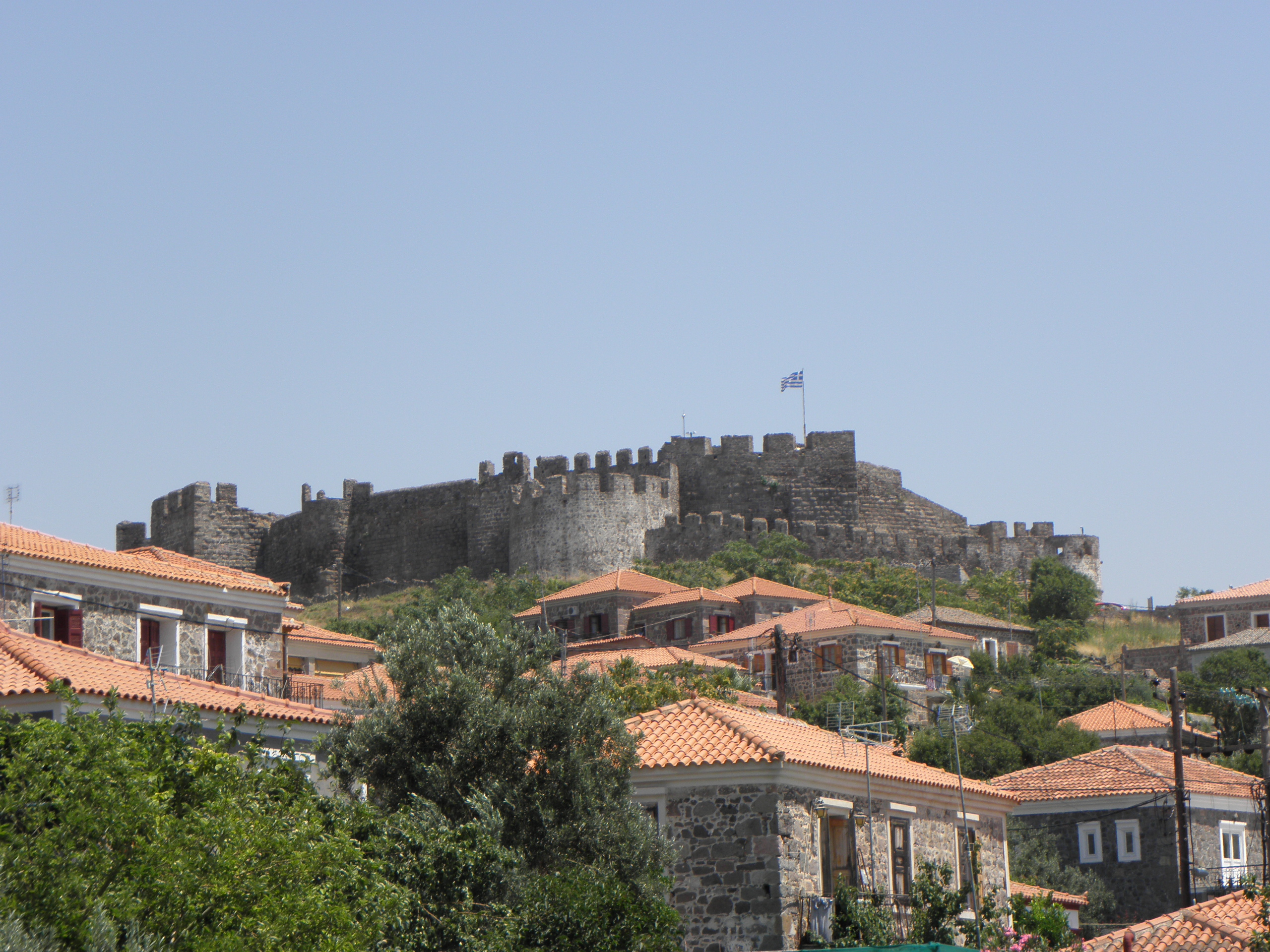 Pohled z přístavu na pevnost v Mithymně, Lesbos